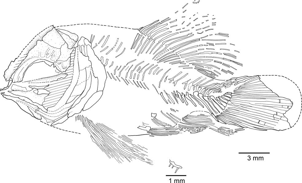 Drawing of Voelklichthys comitatus n. gen. n. sp. in lateral view based on the holotype JME SCH 102 and enlargement of a displaced premaxilla found in the illustrated position. Oblique lines represent broken areas in the head.